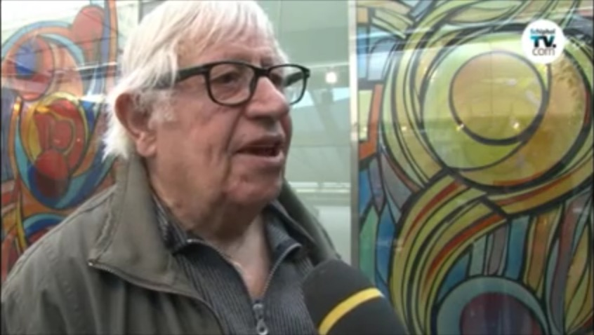 92 jaar oud is hij en nog steeds volop actief als kunstenaar: Jan Murk de Vries. Documentairemaker Lodewijk Luijt volgde de kunstenaar op 22 november naar Schiphol waar zijn bekendste werk hangt.